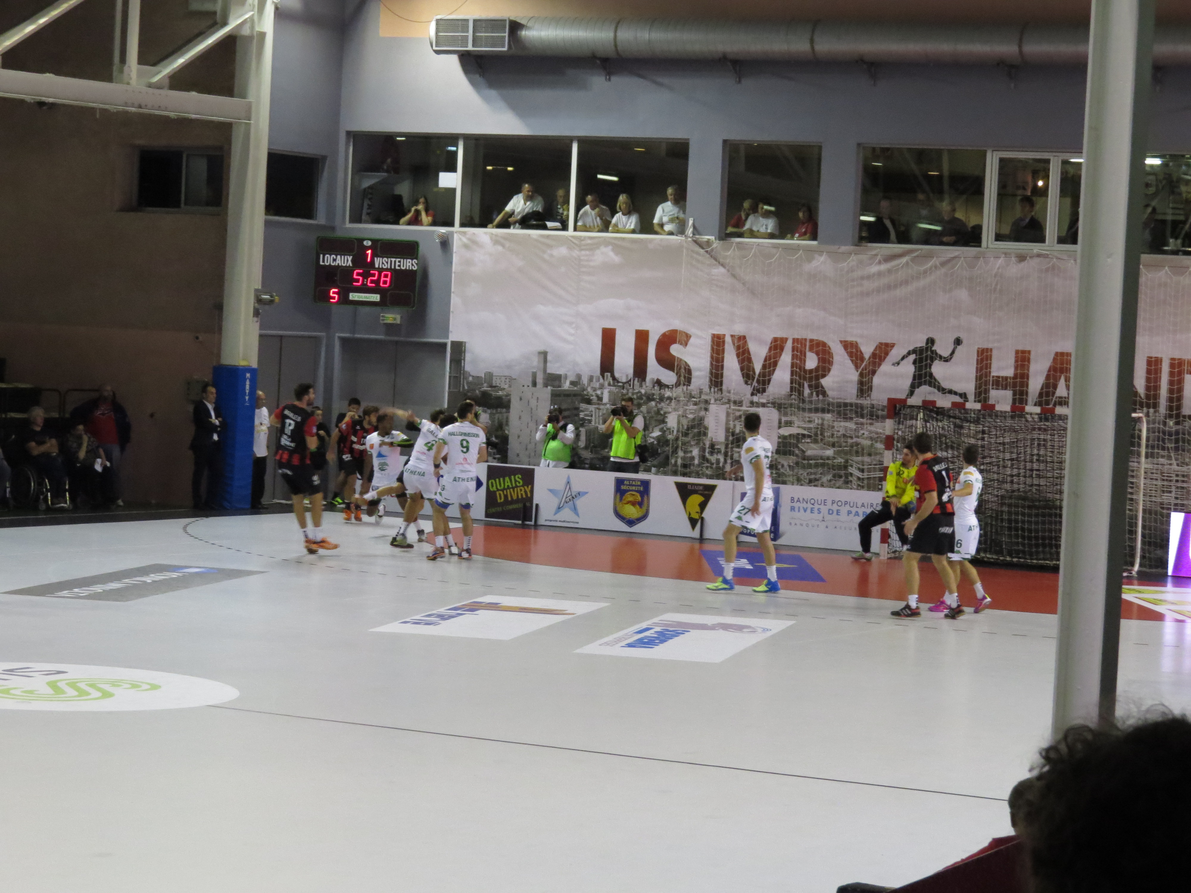 Ivry vs Nimes en LNH le 23 septembre 2015